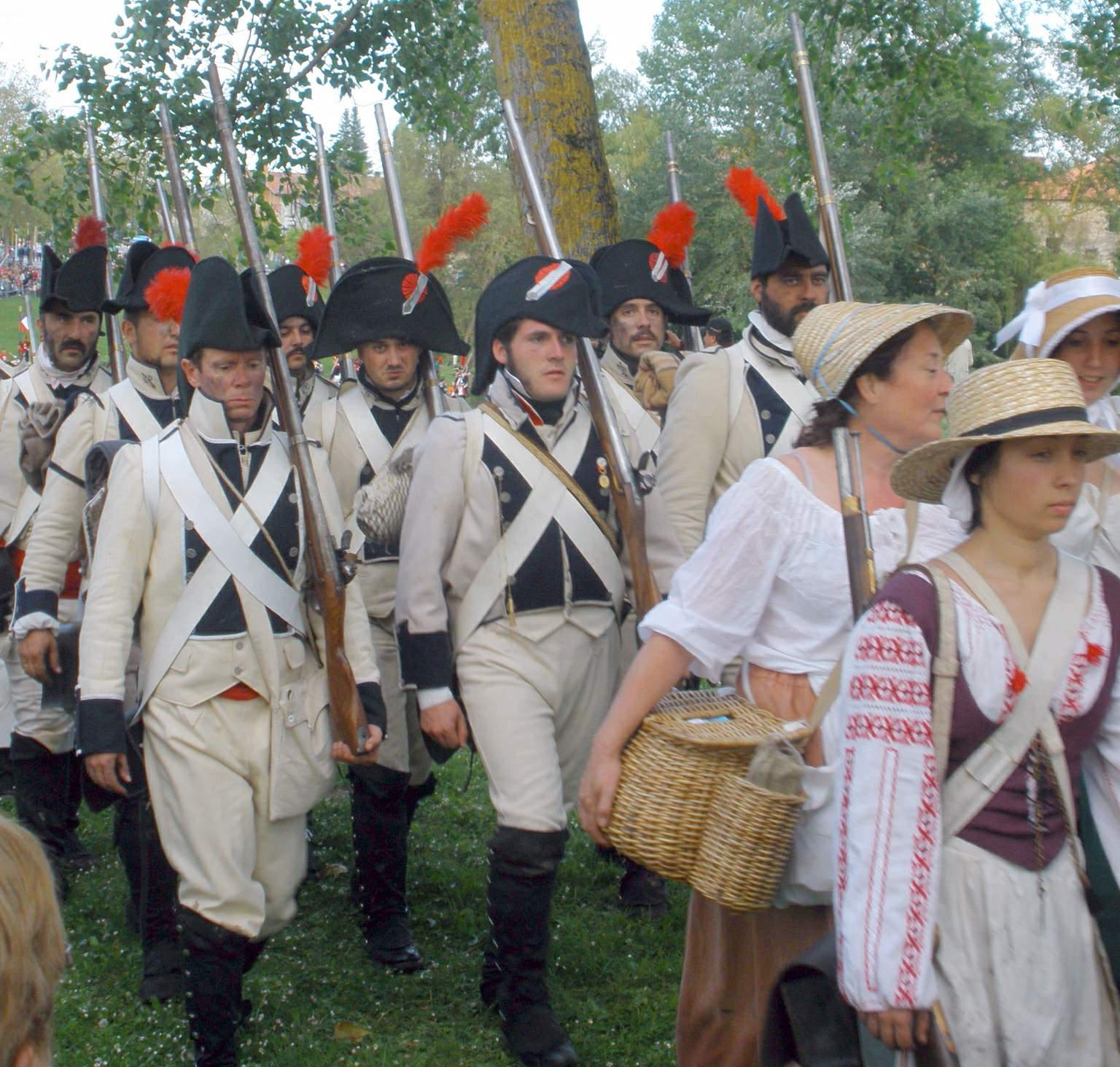 Recreación histórica (reenactment) de la Batalla de Vitoria con motivo del bicentenario del encuentro bélico (1813-2013). Celebrada en las campas de Armentia, en Vitoria-Gasteiz, el 22 de junio de 2013.